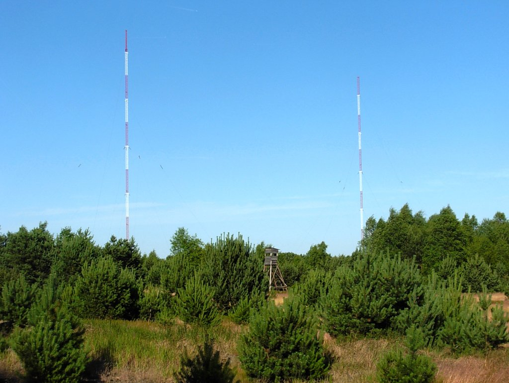 Puszcza Bydgoska - maszty RCN Solec Kujawski